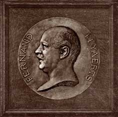 Fernand Feyaerts (1882-1927) - oeuvre du sculpteur Armand Bonnetain (1928) - diam. 430 mm